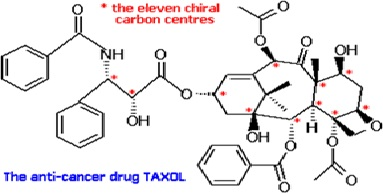 Таксолдың құрылысы